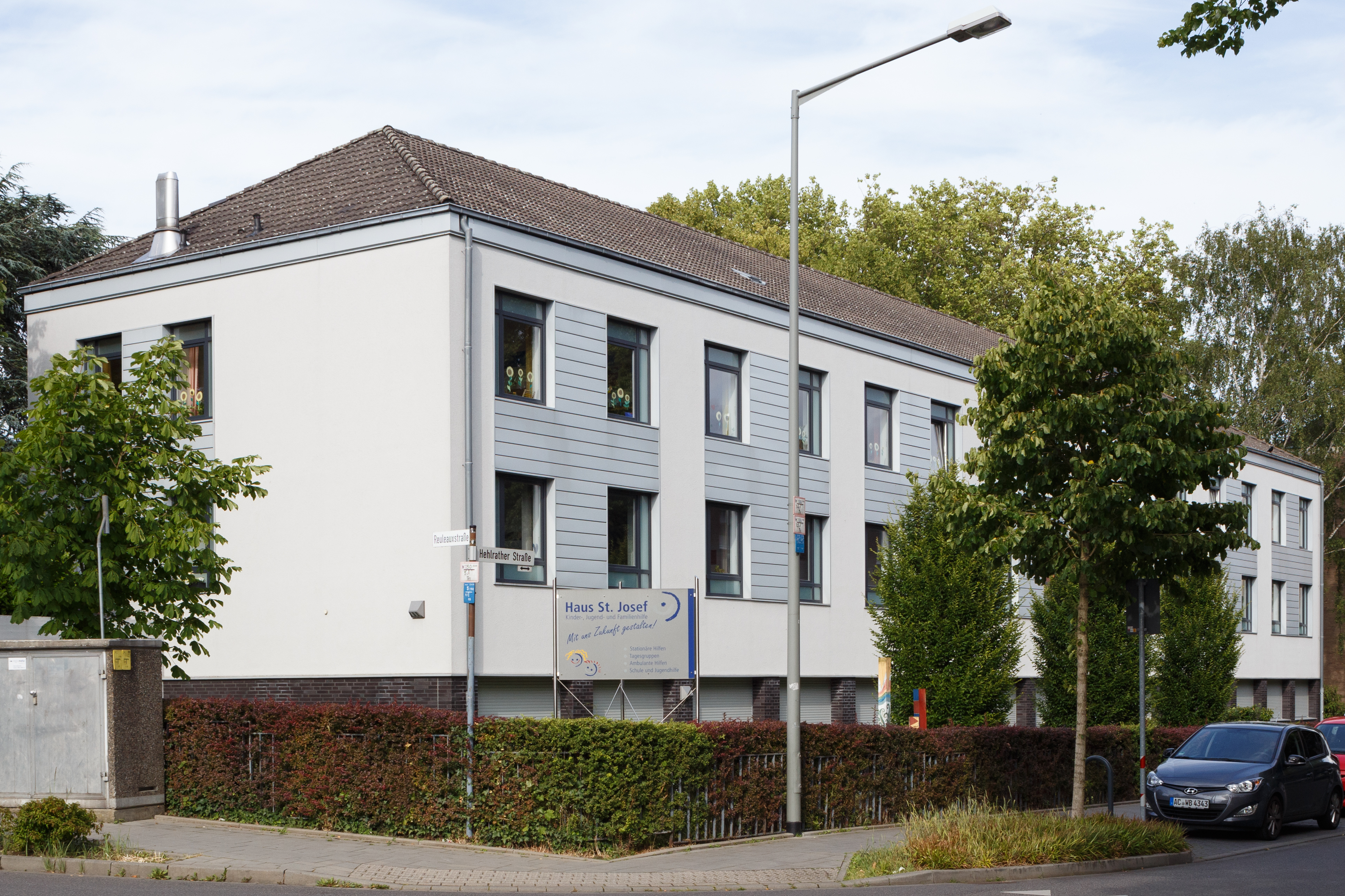 Das "Haus St. Josef" (ehemaliges Kinderheim St. Josef) nach der Renovierung.